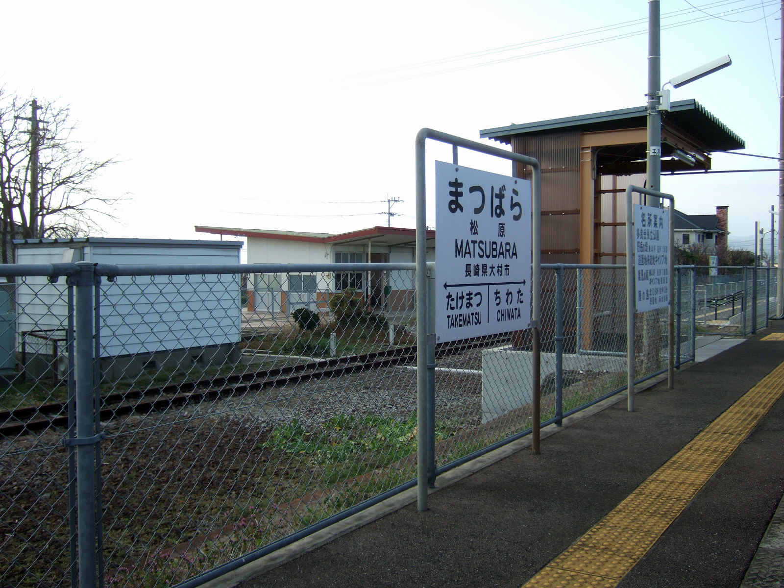 JR九州大村線松原駅（JR-Kyushu Omura Line Matsubara St.）